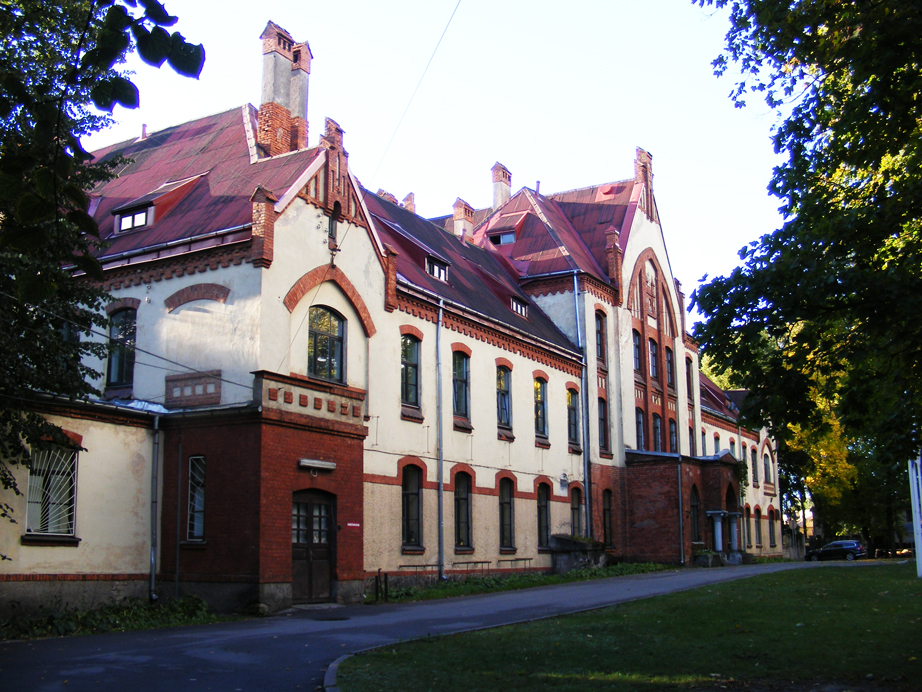 Slimnīcas celtņu komplekss, Rīga, Pilsoņu iela 13